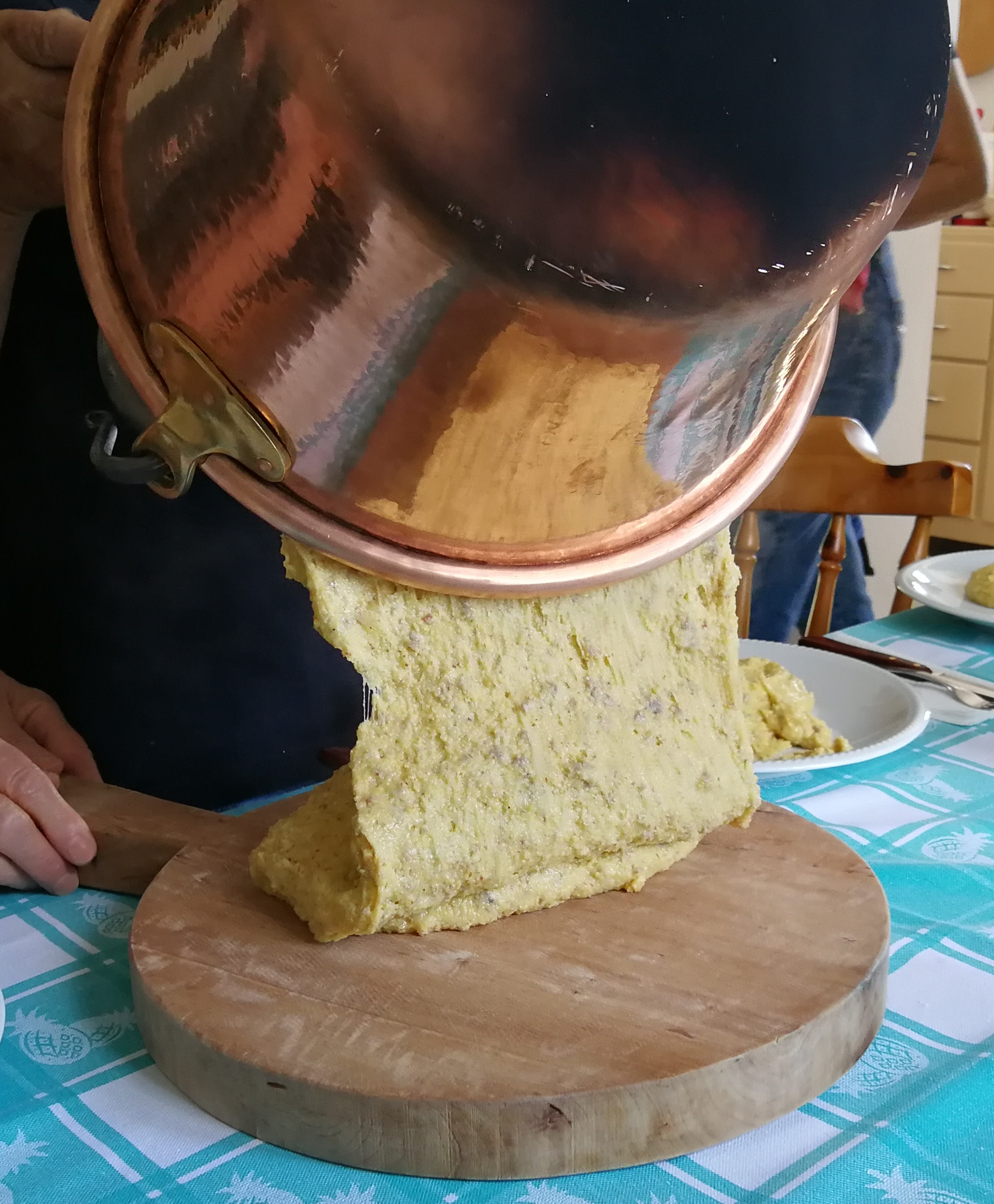 Polenta carbonera - piatto tipico di Storo